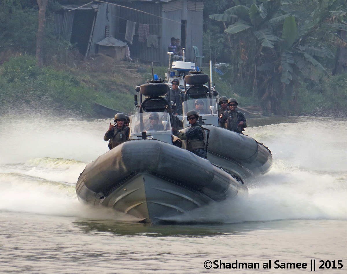 Hardware disp 2015